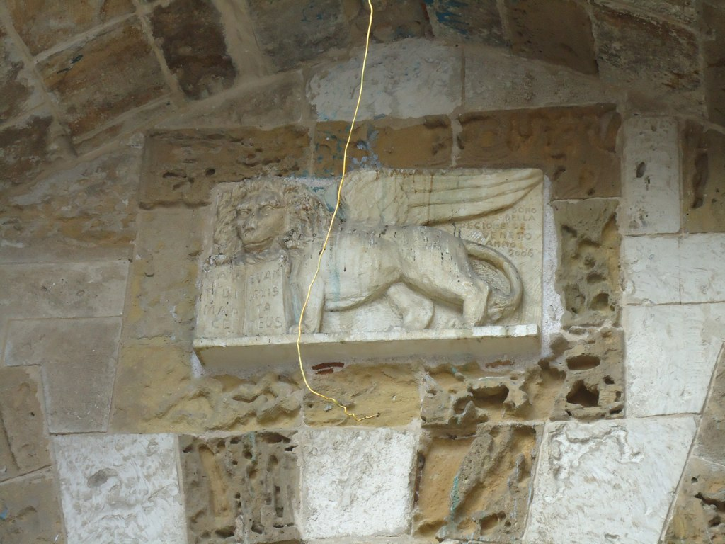 Acre